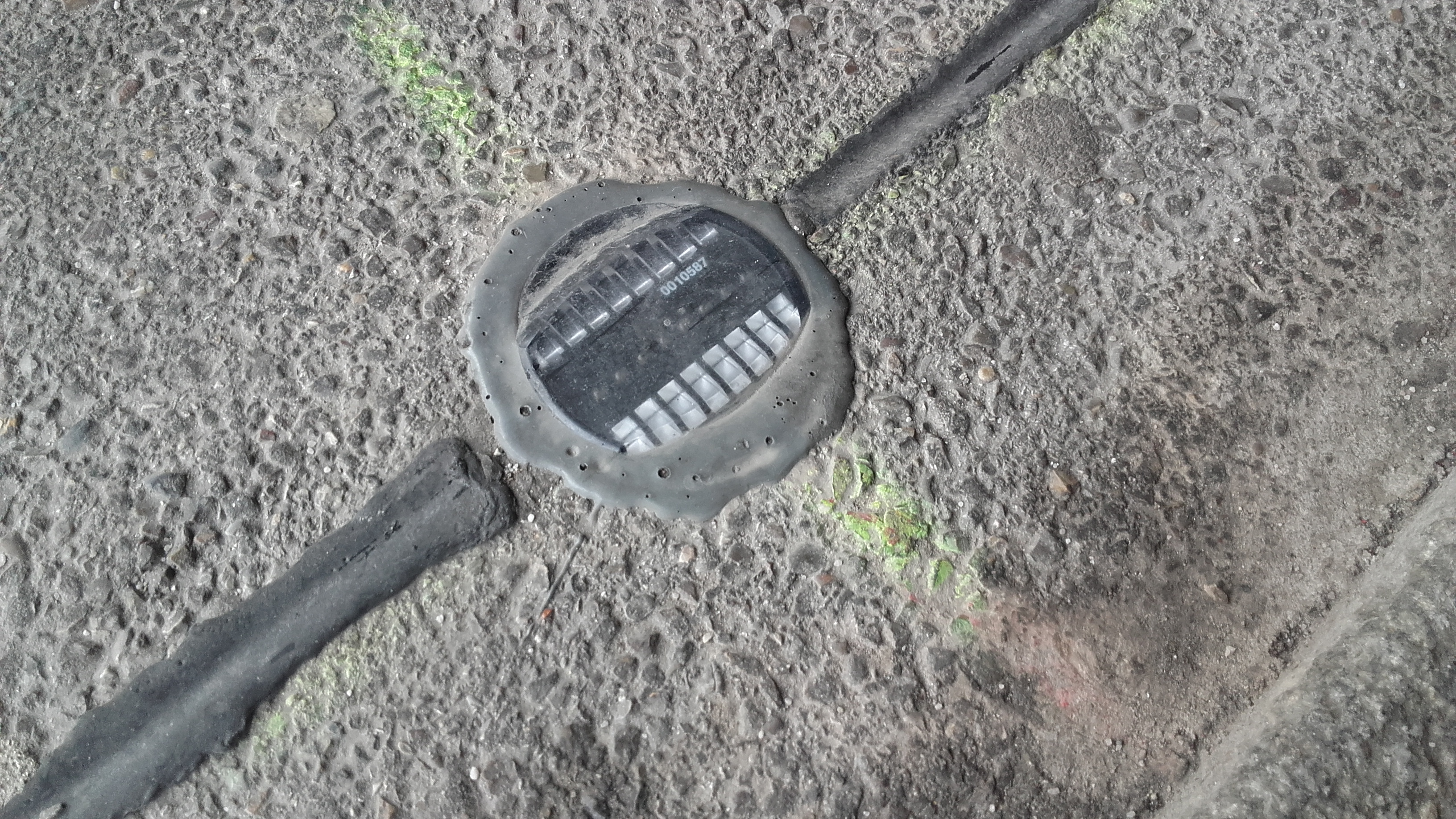 Detailaufnahme Bompel an der Haltestelle Haunstetter Straße in Augsburg